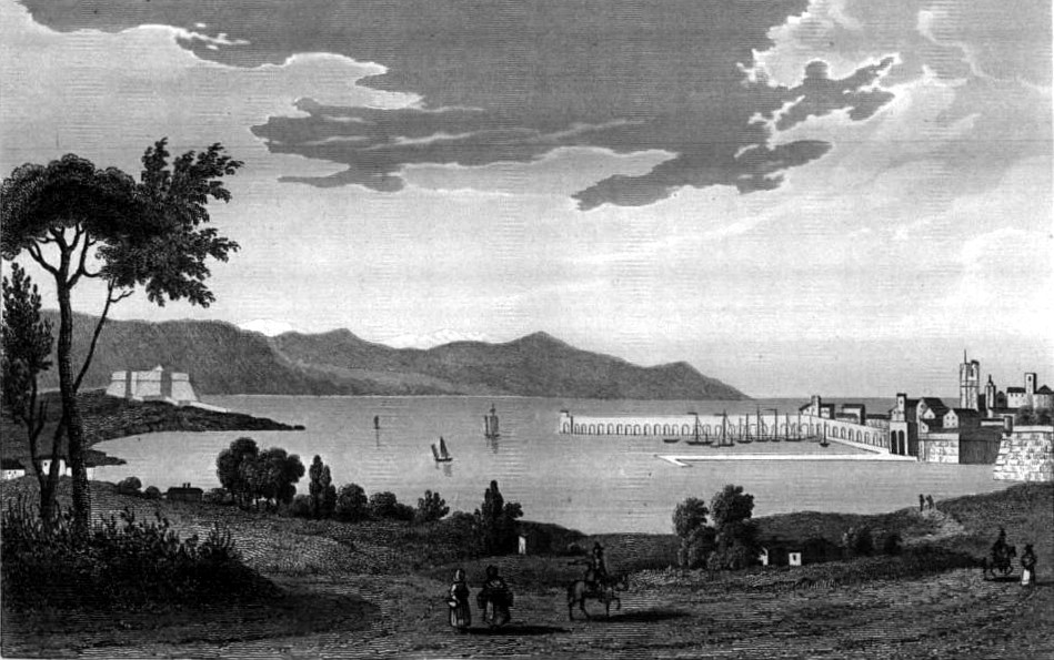 Image en provenance du livre : Eusèbe Girault de Saint-Fargeau, Guide pittoresque du voyageur en France, contenant la statistique et la description complète des quatre-vingt-six départements, orné de 740 vignettes et portraits gravés sur acier, de quatre-vingt-six cartes de départements et d'une grande carte routière de la France, par une Société de gens de lettres, de géographes et d'artistes, Paris, F. Didot frères, 1838, 6 volumes in-8° (BNF : 8-L25- 46). Volume III Didot frères, 1838. Route de Paris à Nice traversant les départements de l'Isère, des Hautes-Alpes, des Basses-Alpes et du Var. auteurs dessins : Rauch (ou autre) auteurs gravures : Skelton fils, Schroeder, Bishop (ou autre)